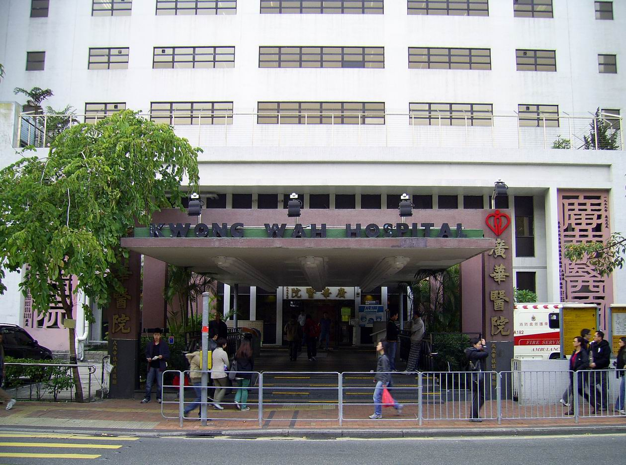 廣華醫院主座正門